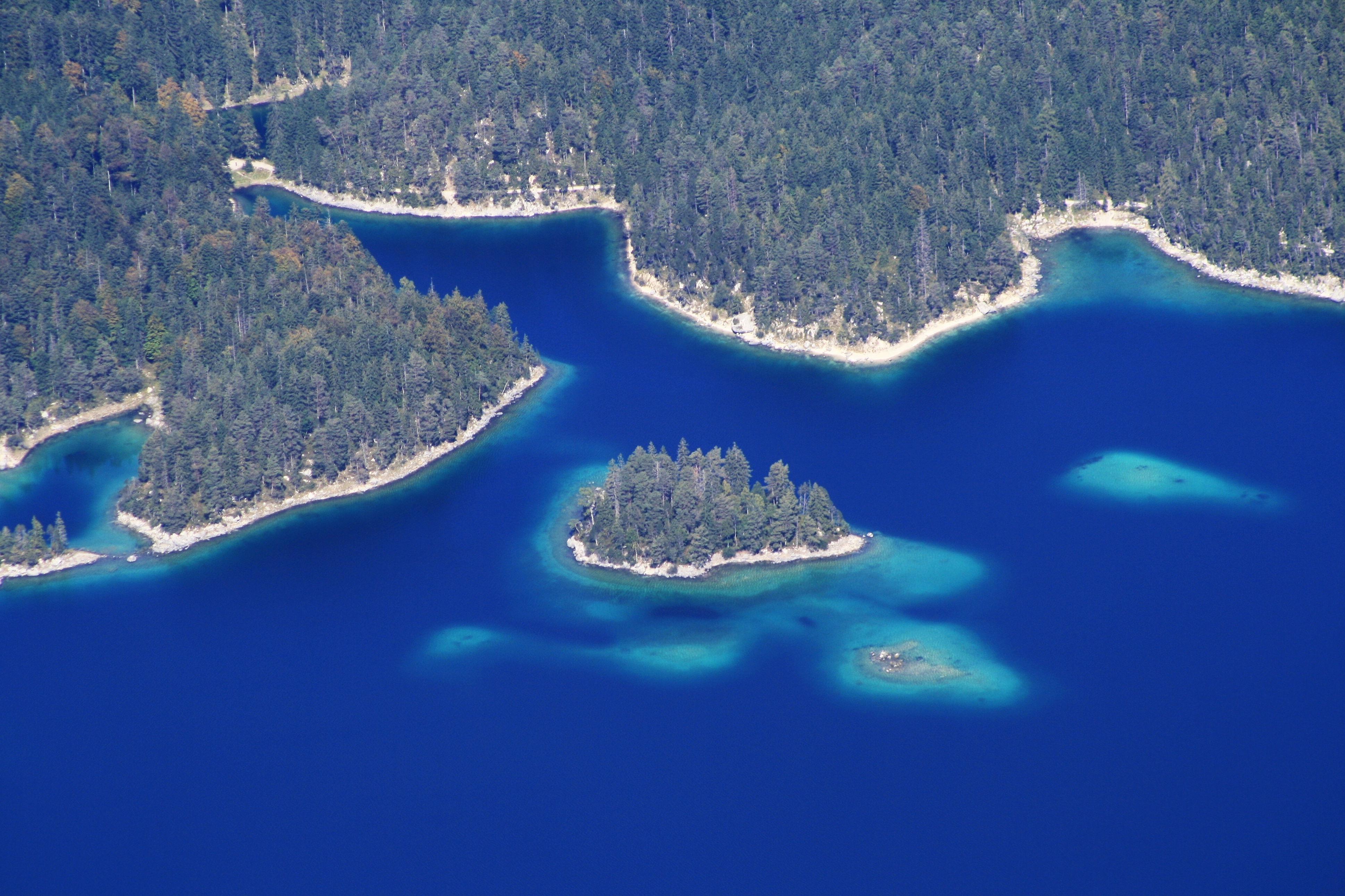 Blick von der Zugspitze, dem höchsten Berggipfel Deutschlands, auf den Eibsee, der im Landschaftsschutzgebiet „Wettersteingebiet einschließlich Latschengürtel bei Mittenwald“ (LSG-00281.01) liegt; im See die Sasseninsel und davor Steinbichl.